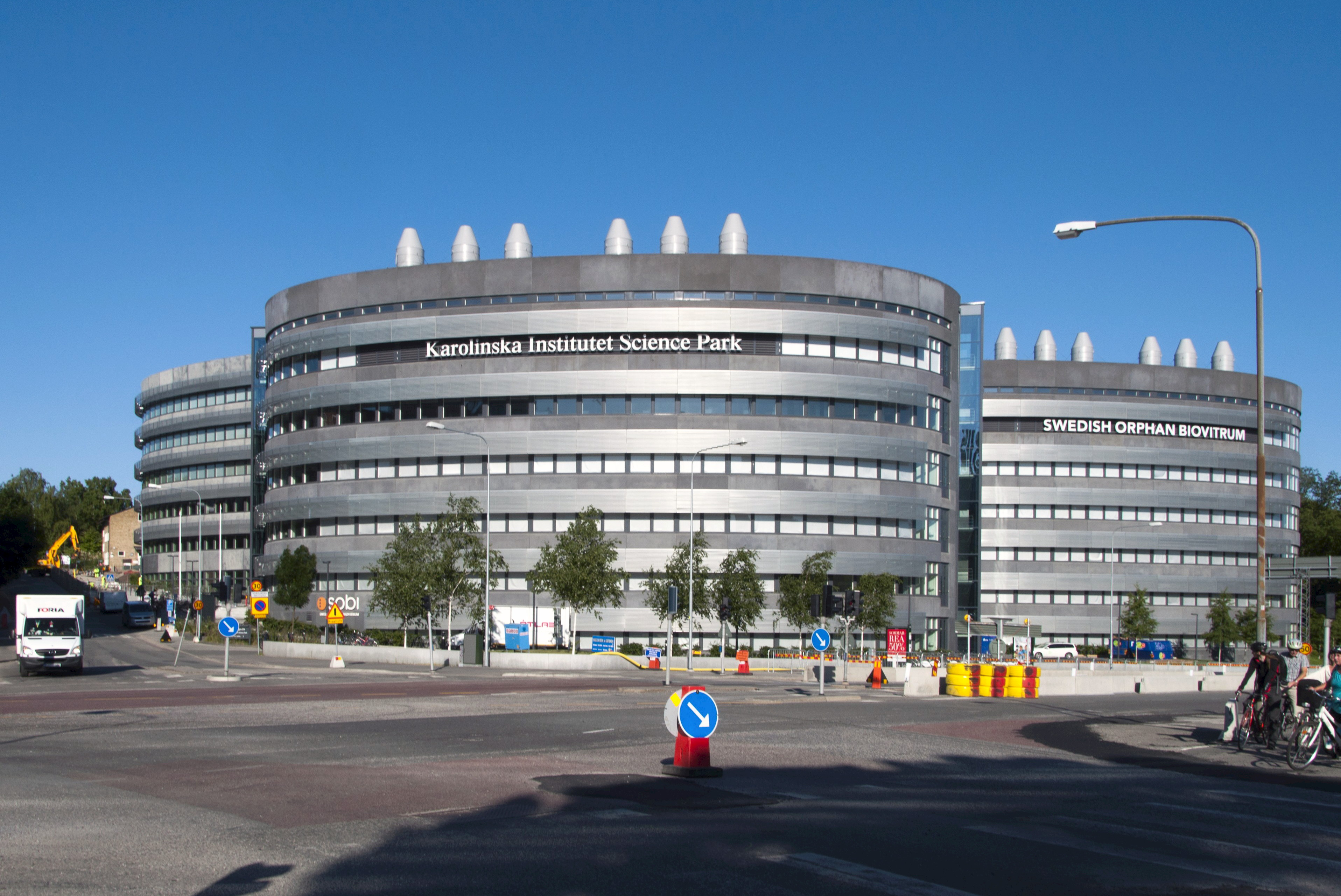 Karolinska Institutet Science Park i korsningen Tomtebodavägen/Solnavägen. Invigt 2010. Ansvariga arkitekter Stefan Ekholm, Peter Lindberg och Jon Tvedt på SWECO